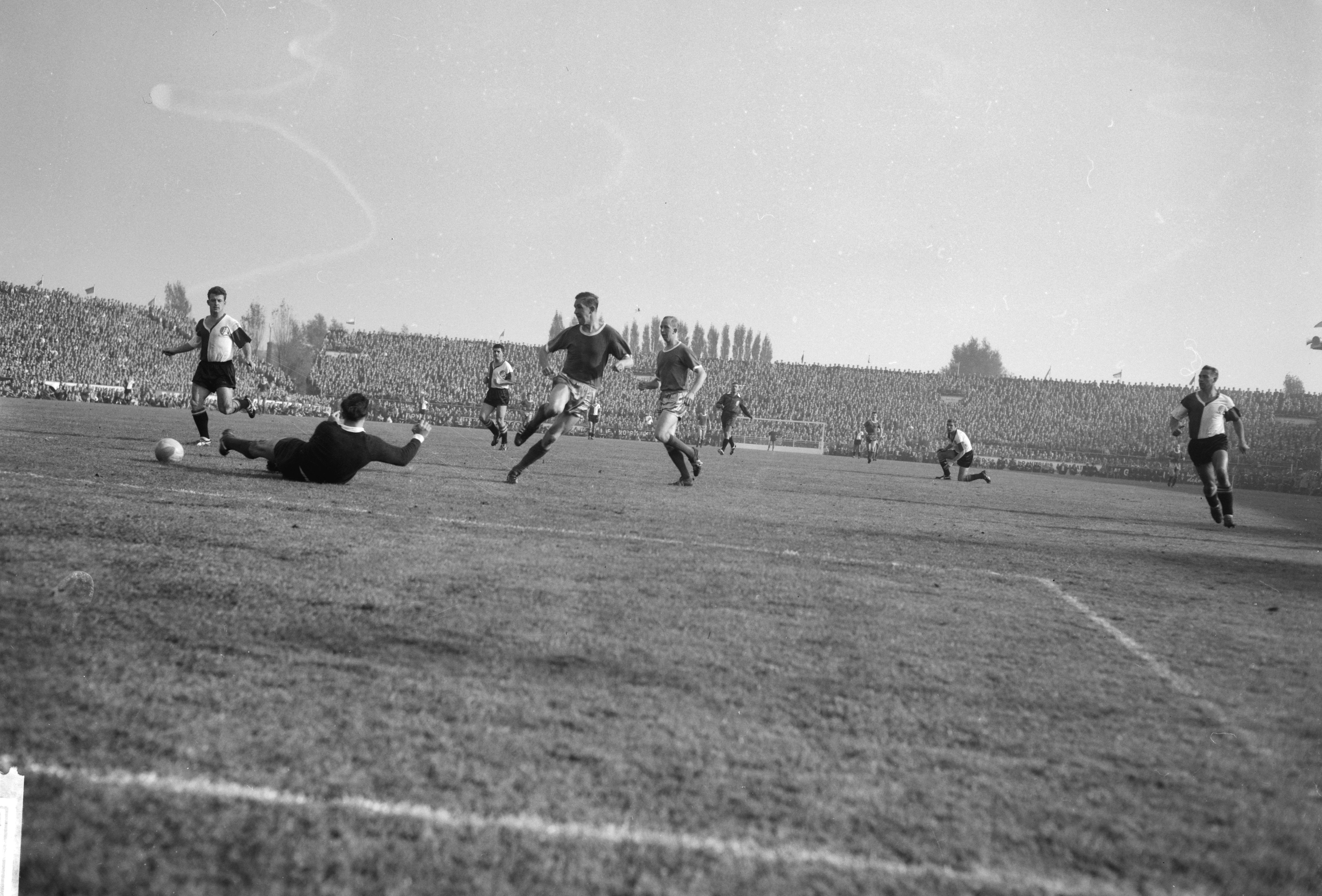 Collectie / Archief : Fotocollectie Anefo Reportage / Serie : [ onbekend ] Beschrijving : Ajax tegen Feyenoord 1-3. Kreyermaat, Pieters Graafland, Bak, Cees Groot , Henk Groot Datum : 15 oktober 1961 Locatie : Amsterdam Trefwoorden : sport, voetbal Instellingsnaam : Feyenoord Fotograaf : Bilsen, Joop van / Anefo Auteursrechthebbende : Nationaal Archief Materiaalsoort : Negatief (zwart/wit) Nummer archiefinventaris : bekijk toegang 2.24.01.04 Bestanddeelnummer : 913-0536 Reacties Geplaatst door Maaike op 21 maart 2014 - 19:25. Persoonsnamen: Reinier Kreijermaat